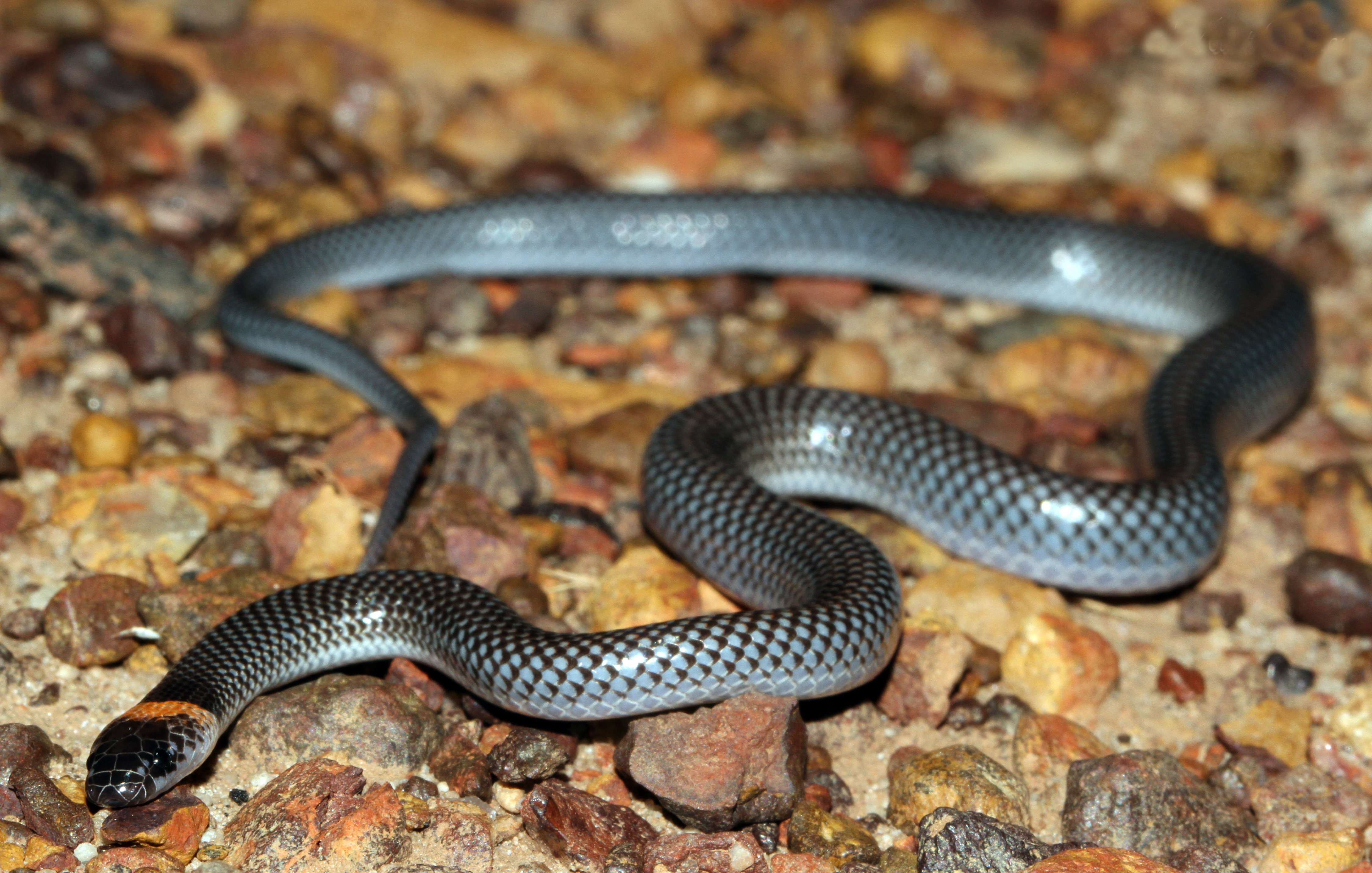 Kakadu NT.